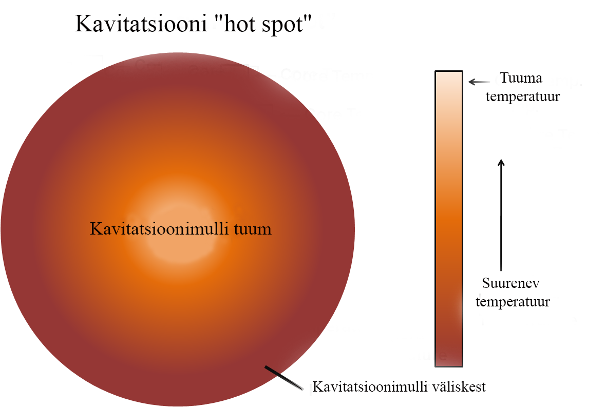 Kavitatsiooni hot spot